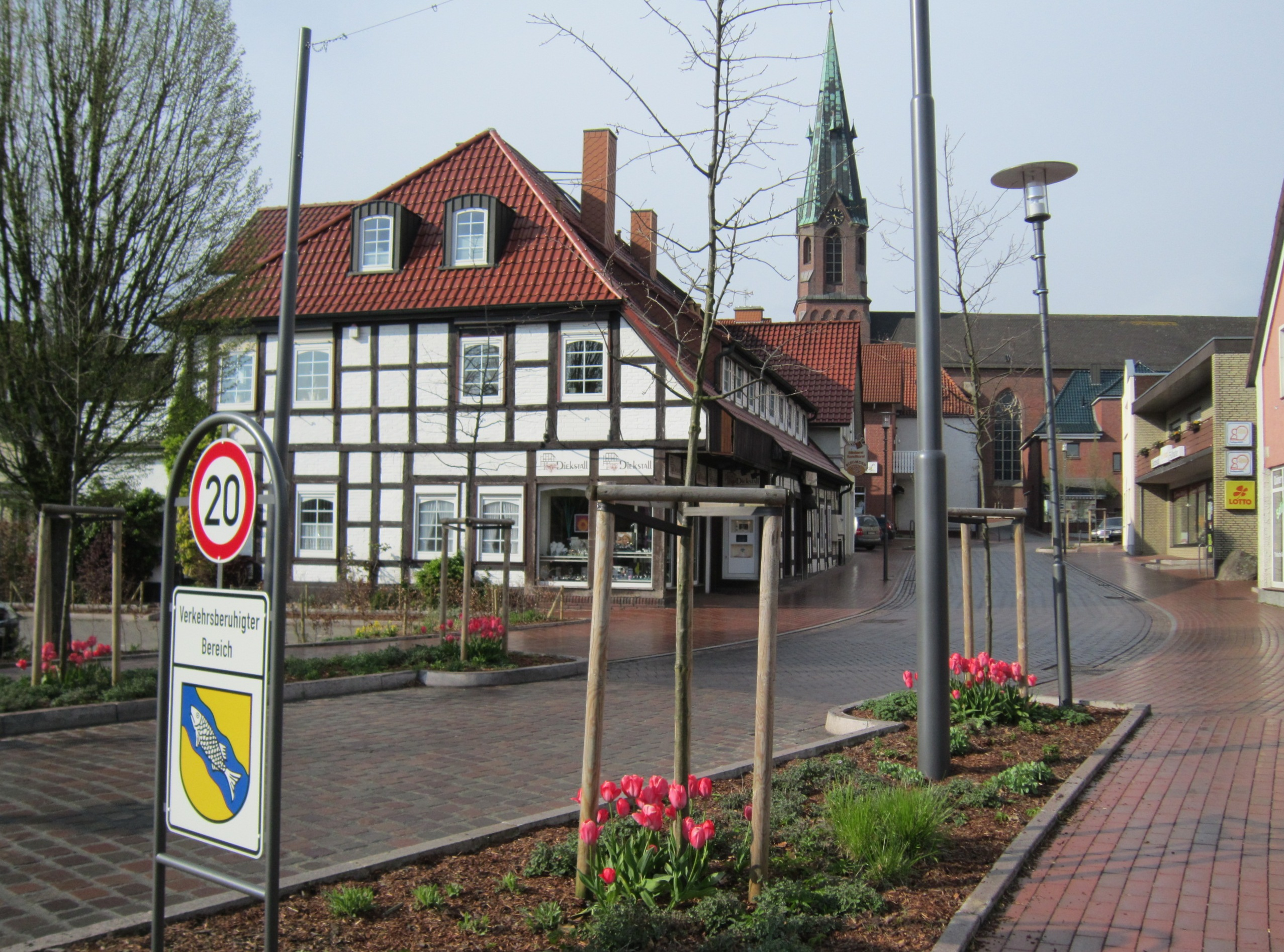 Verkehrsberuhigter Eingang in den Ortskern von Visbek (Landkreis Vechta, Niedersachsen) aus den Richtungen Vechta, Schneiderkrug und Ahlhorn